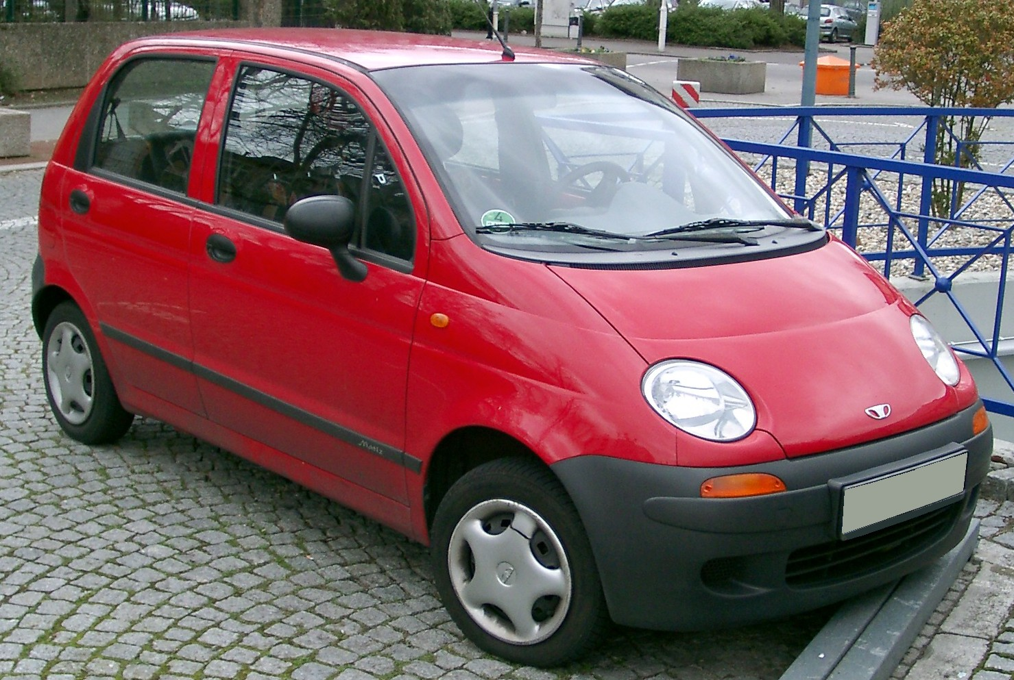 Daewoo Matiz